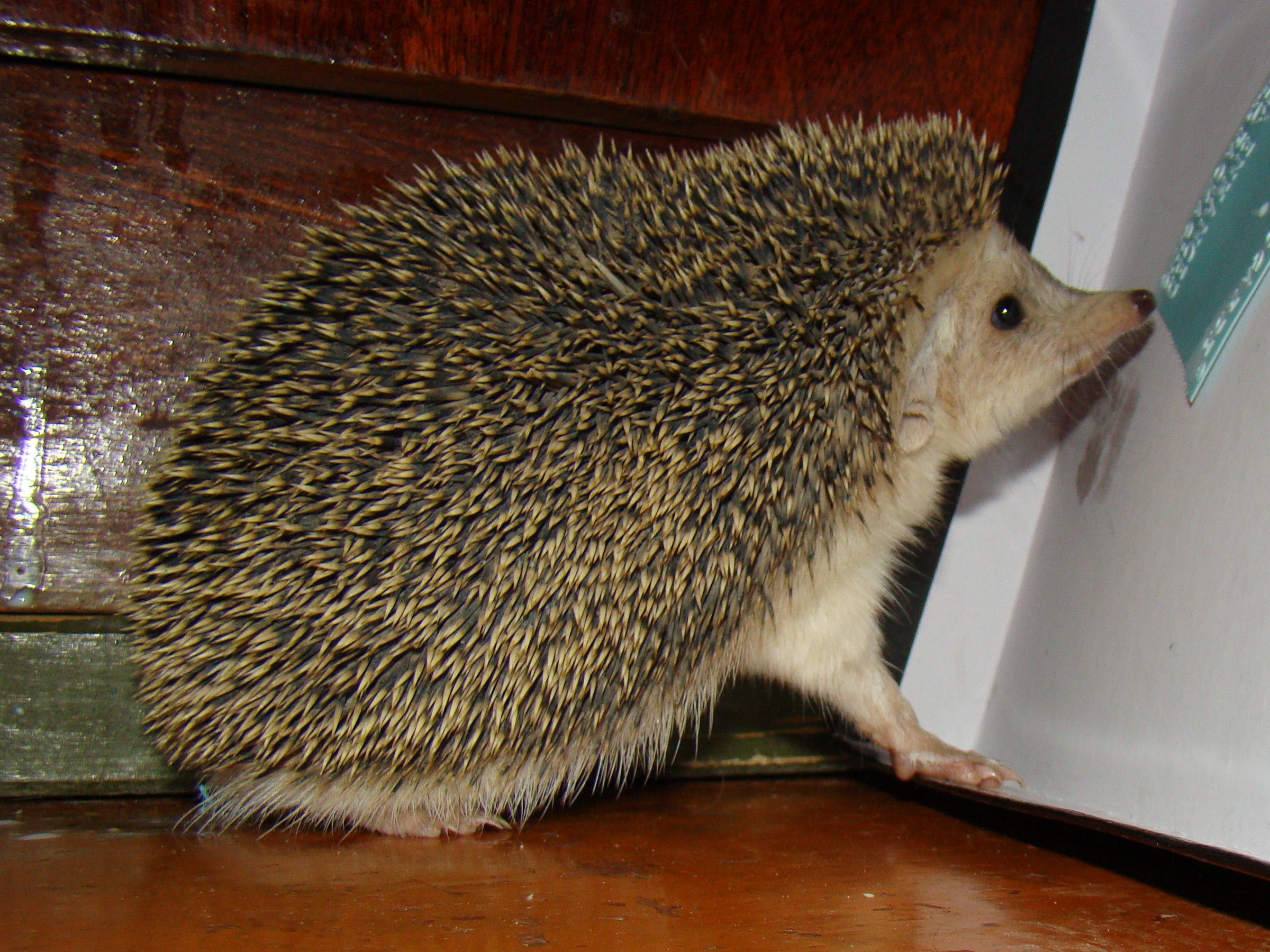 Ушастый ёж (Hemiechinus auritus). Город Байконур, Кызылординская область, Казахстан